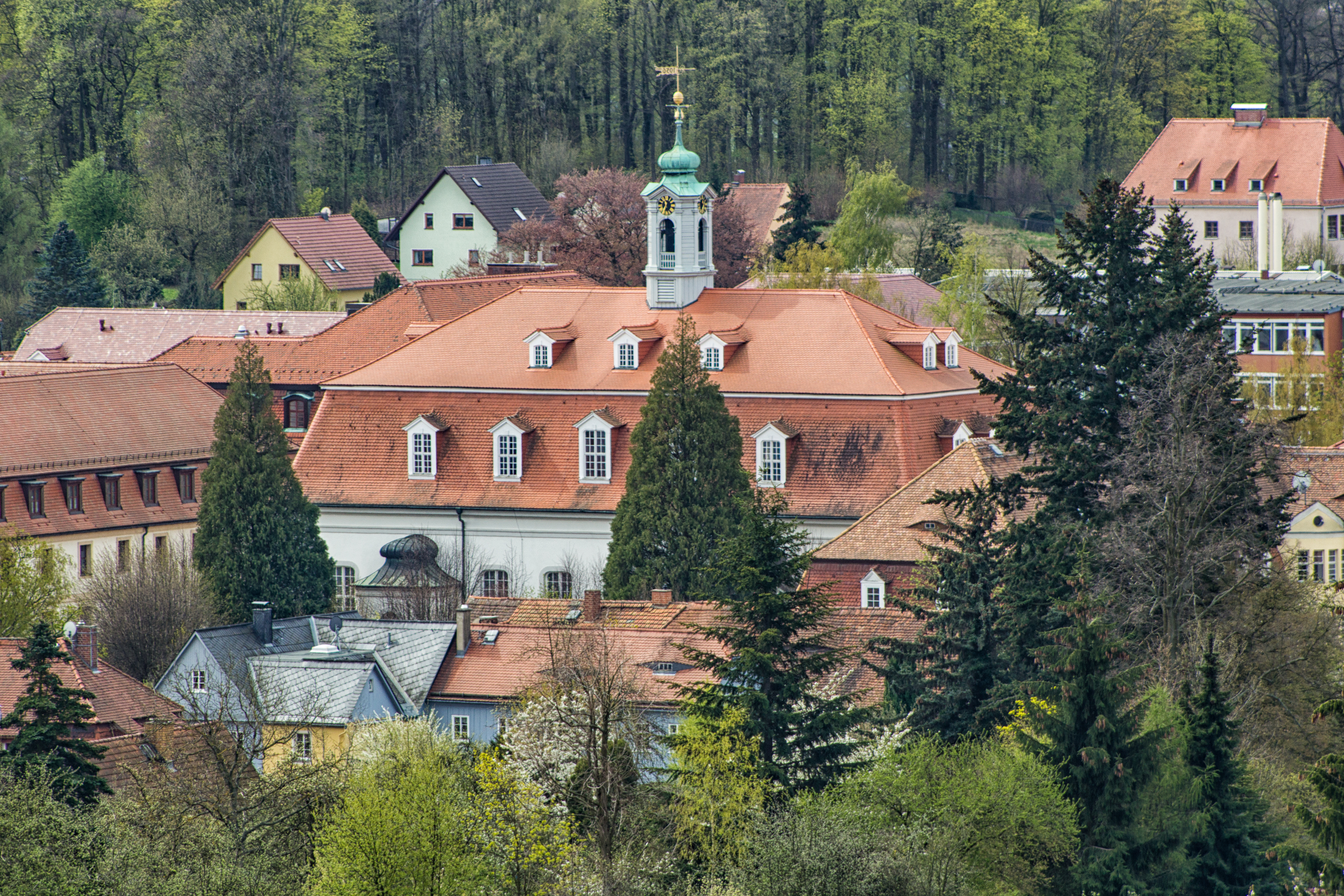 Kirchsaal (Herrnhut) - Vom Hutberg aus gesehen